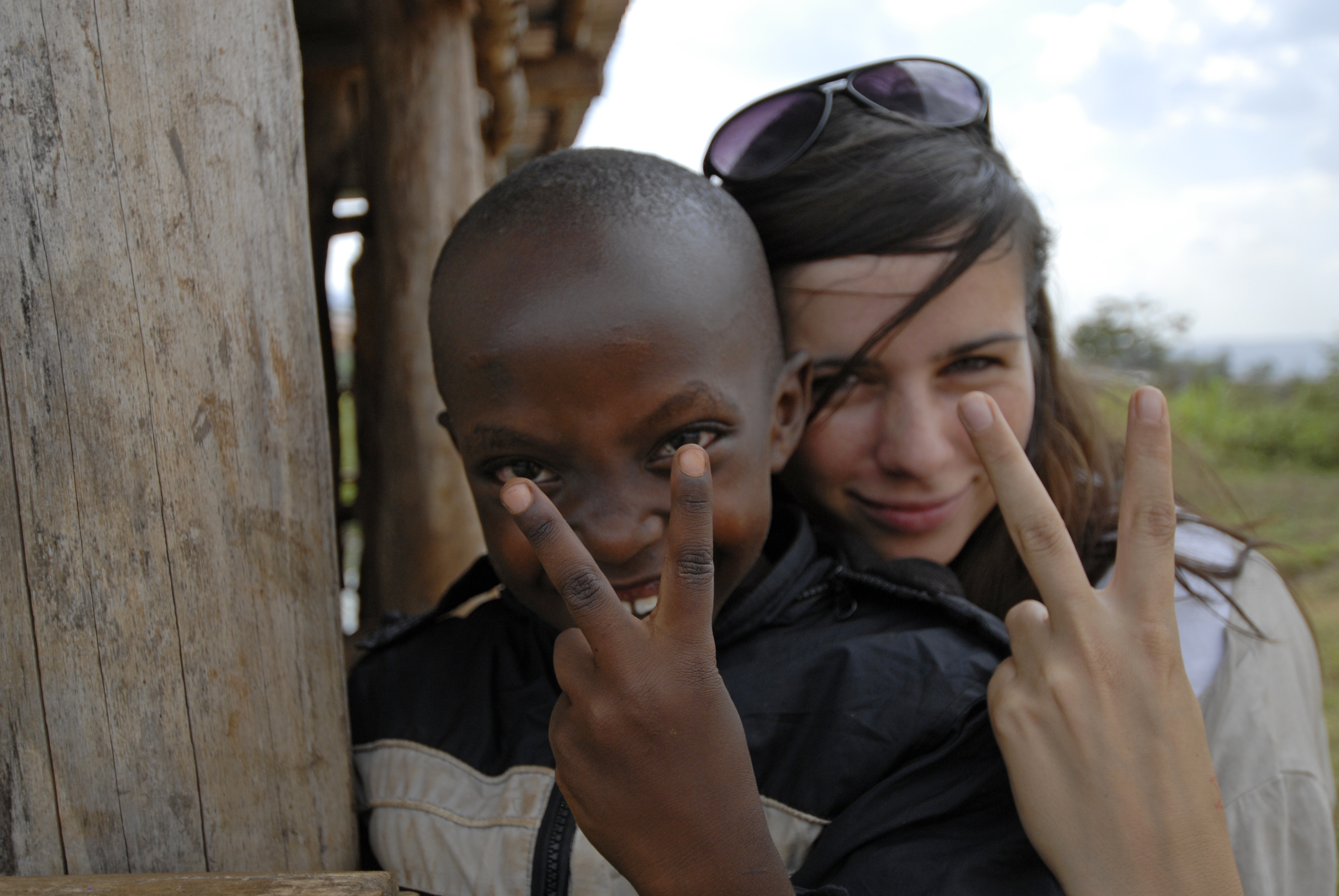 Nora Tschirner auf Projektreise mit Aktion Tagwerk - Hier zu sehen: Centre de Jeunes, Gatenga